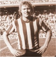 felix orte en banfield